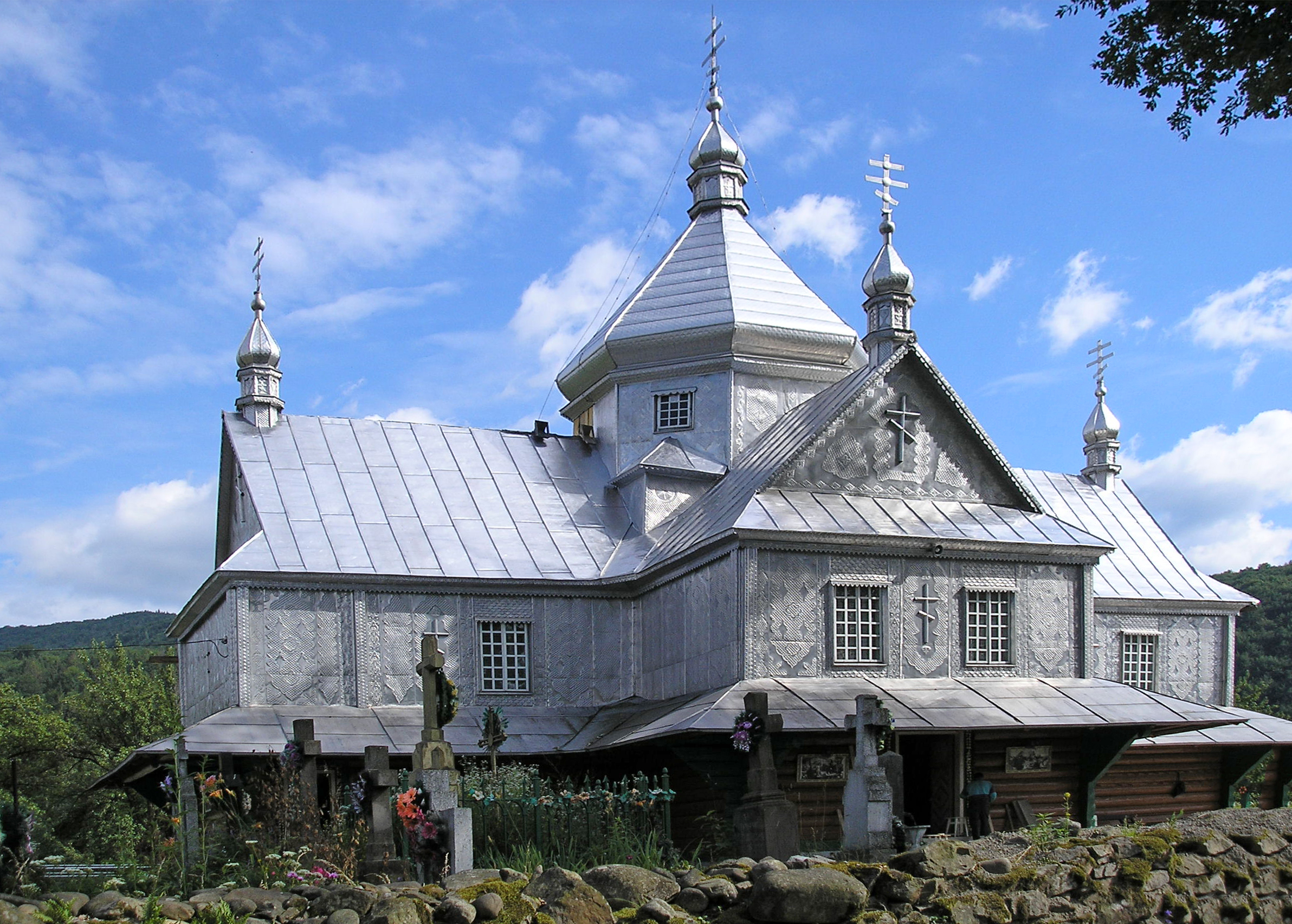 Церква Св. Параскеви (дер.) 1874р. Косівський район с. Шешори